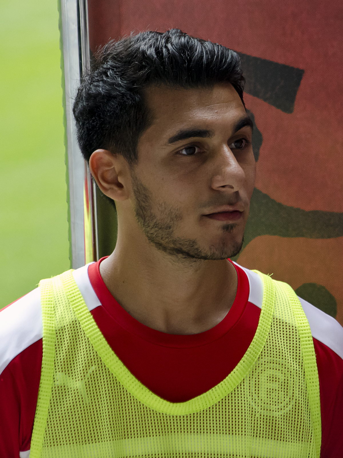 Özkan Yildirim, deutscher Fußballspieler (2016)